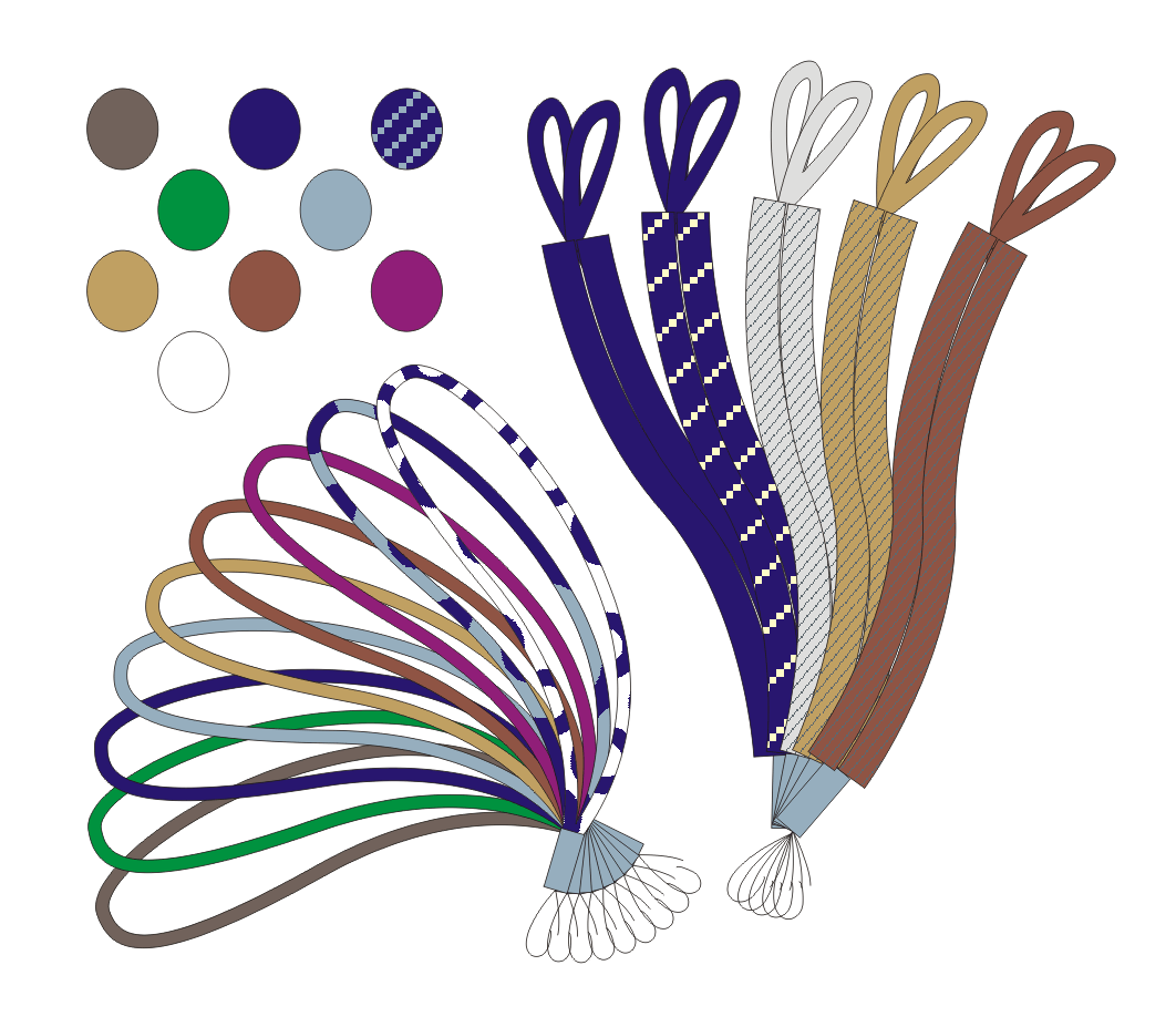 Wszystkie sznury i suwaki używane w ZHP do oznaczania funkcji